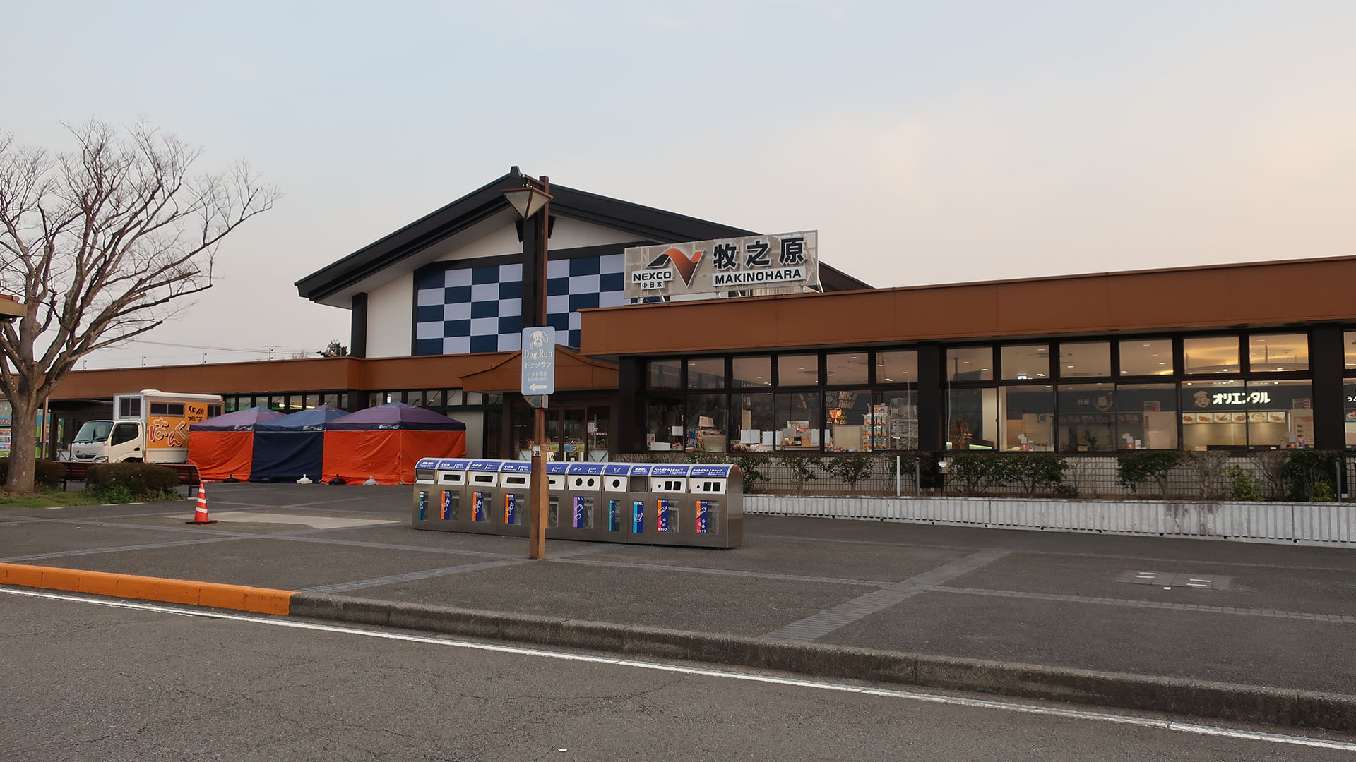 東名高速道路 牧之原SA